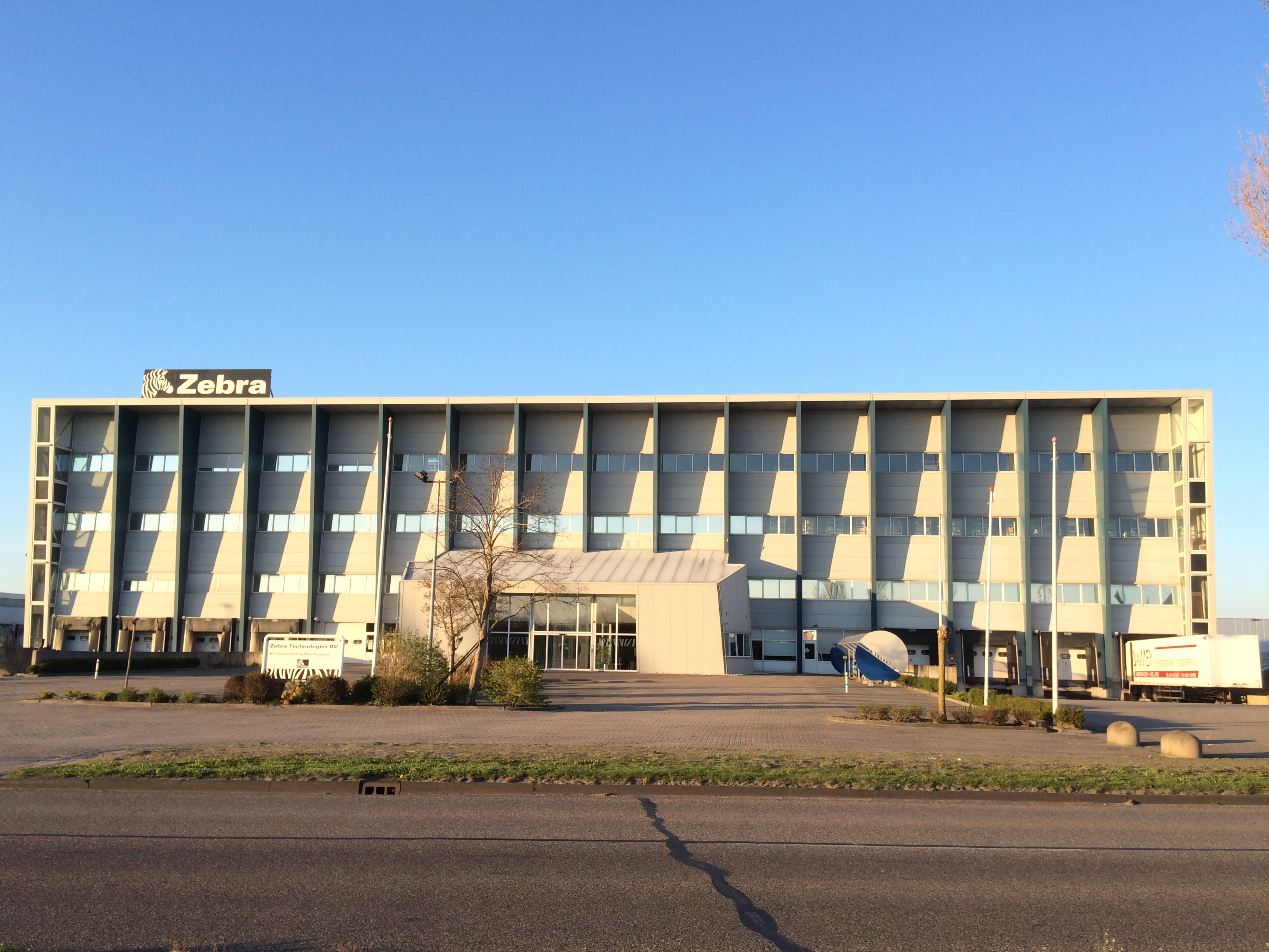 Zebra Technologies aan de Mercurius 12 in Heerenveen.